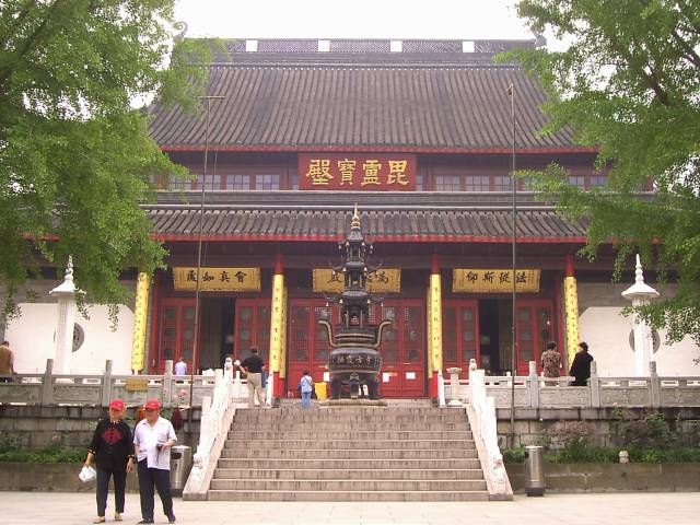 栖霞寺 2004年5月29日撮影 撮影者:権作 参照：